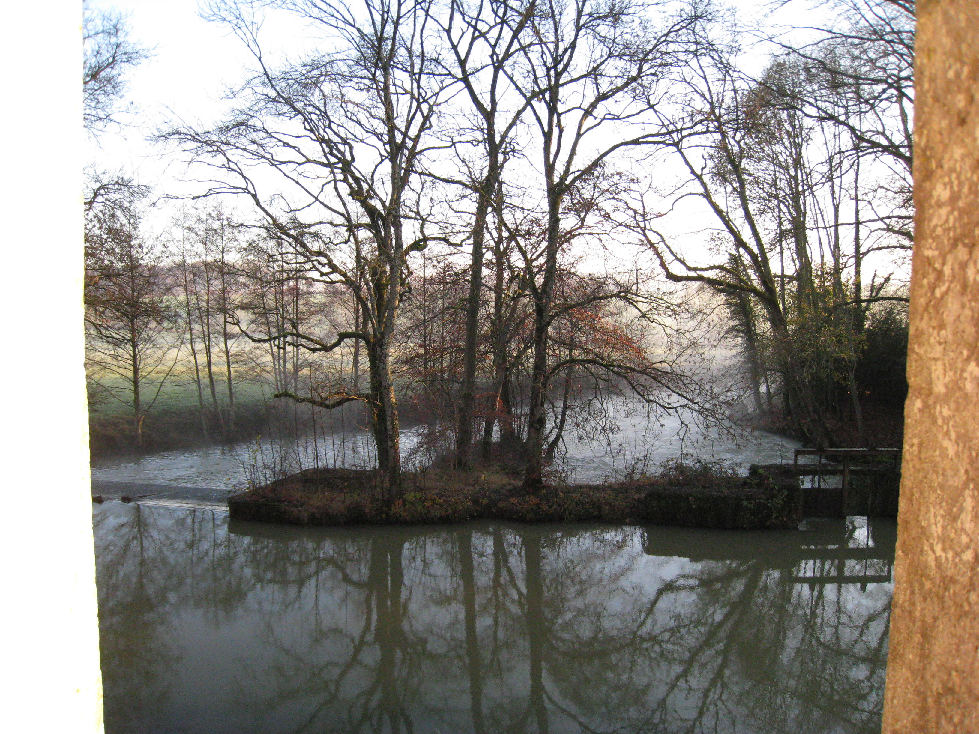 La Vingeanne, au déversoir et vannage de décharge de la Romagne